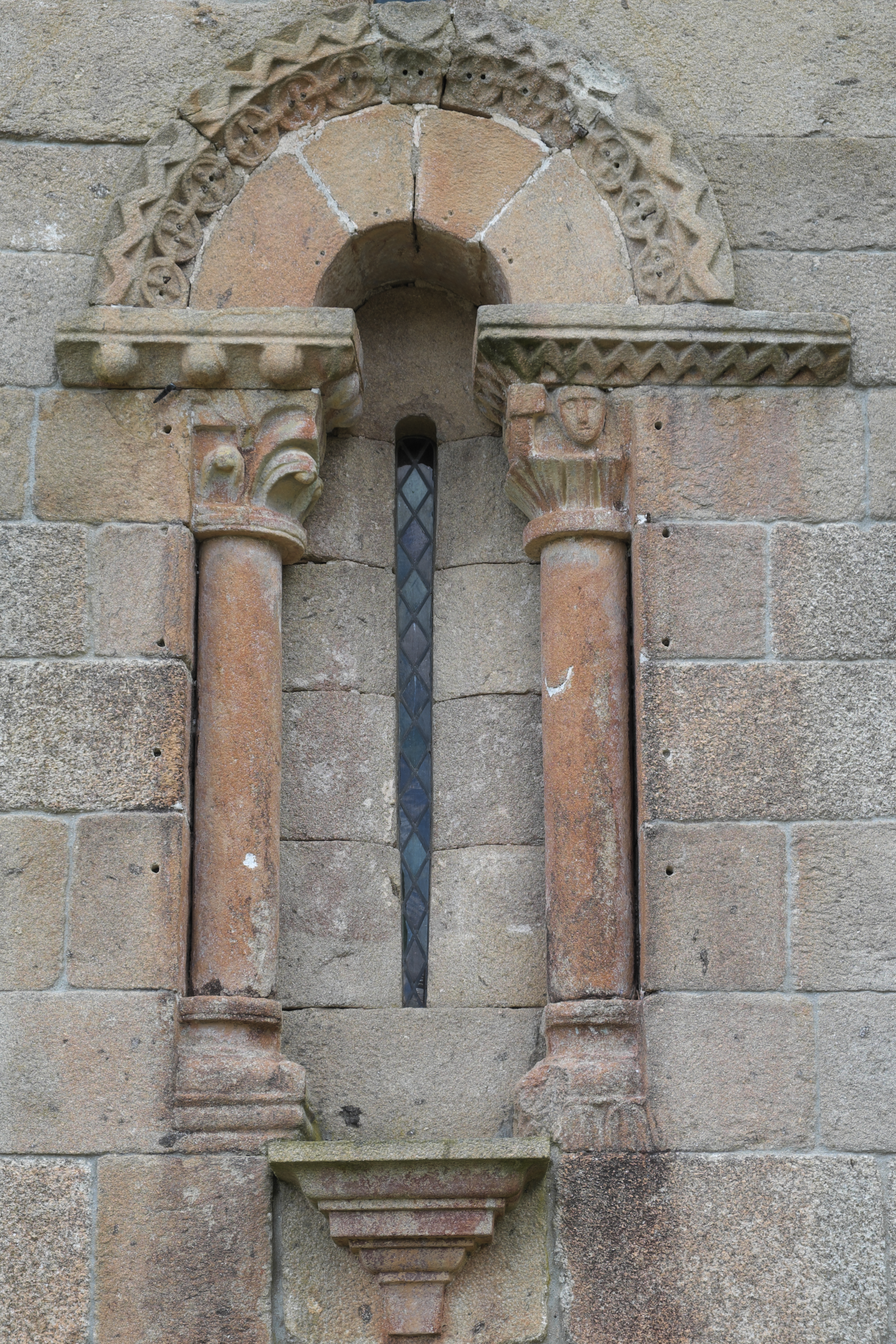 Romanische Pfarrkirche Santa Maria in Covas do Barroso, einer Freguesia von Boticas in der Região Norte (Portugal), Fenster